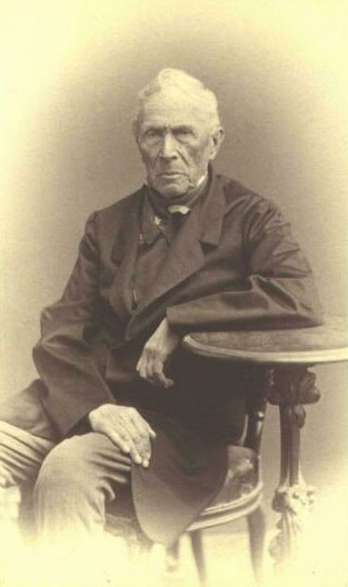 Дмитрий Анндреевич Донец-Захаржевский. Государственный деятель и ученый.